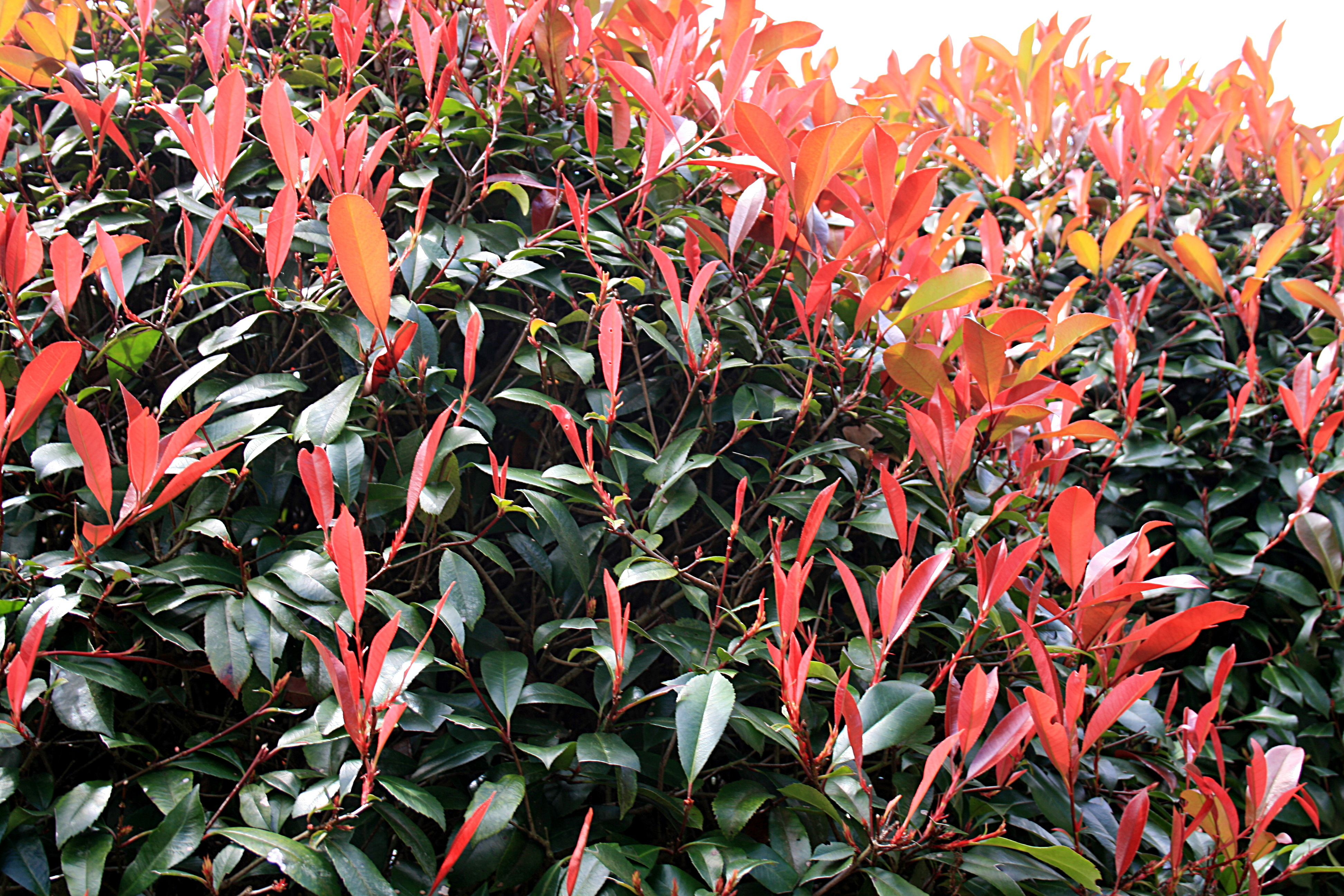 Monte_(Funchal): Photinia_x_fraseri_(Glanzmispel_'Red_Robin')